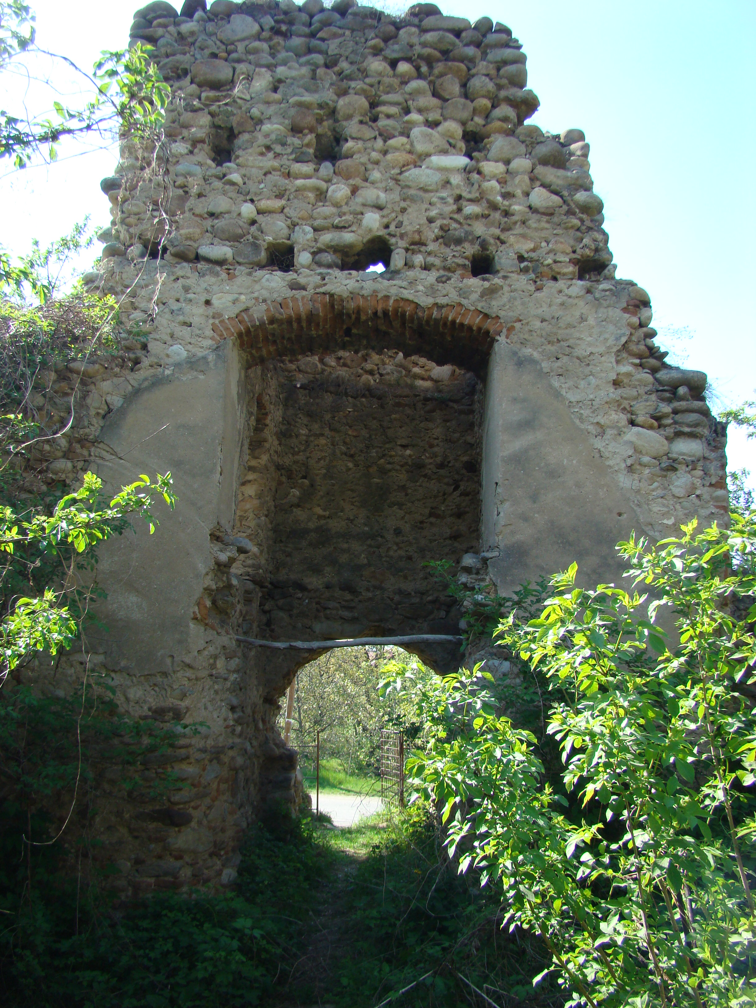 Curtea cnezilor Cândreş, sat SĂLAŞU DE SUS; comuna SĂLAŞU DE SUS